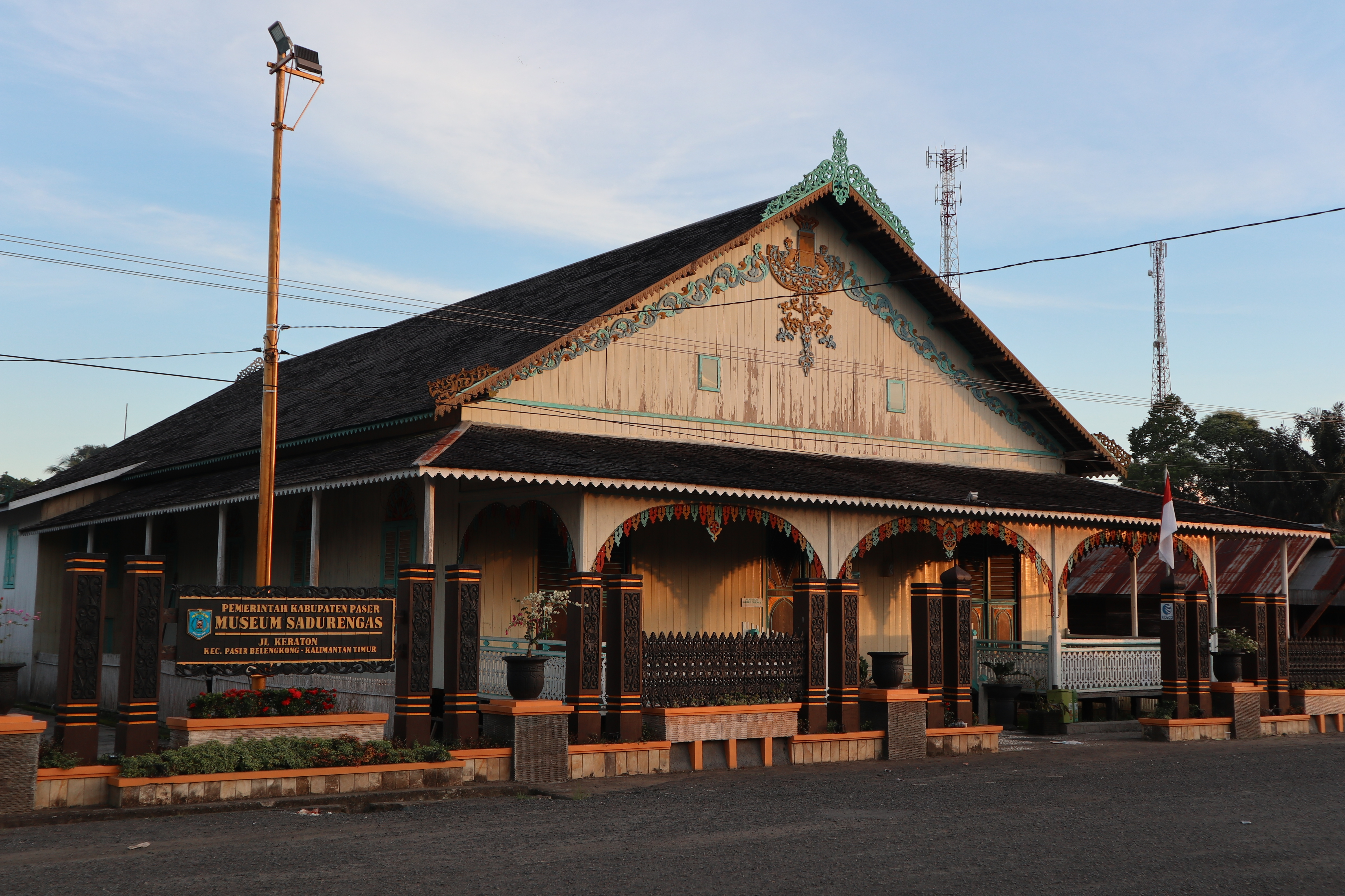 Museum Sadurengas yang dulunya merupakan istana dari Kesultanan Paser atau Kerajaan Sadurengas. Museum ini berlokasi di kecamatan Paser Belengkong, Kabupaten Paser, Kalimantan Timur.